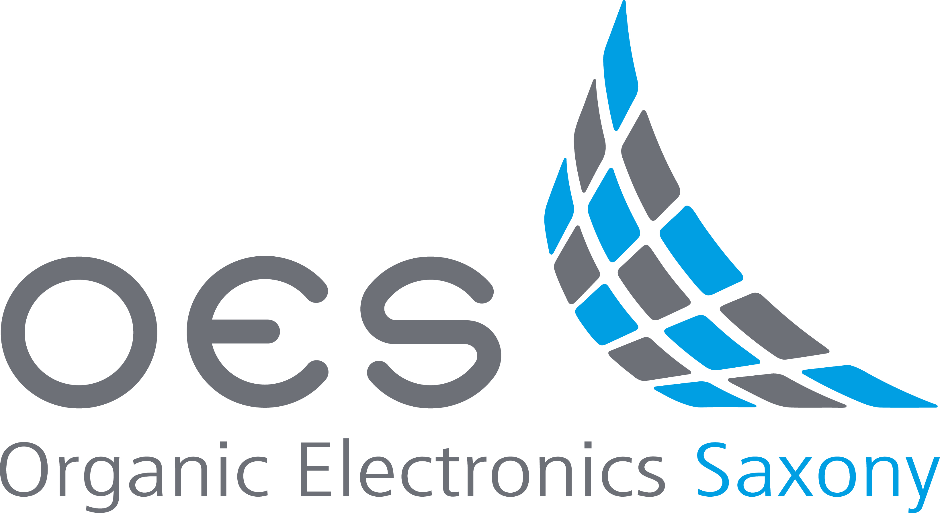 Logo des Netzwerkes